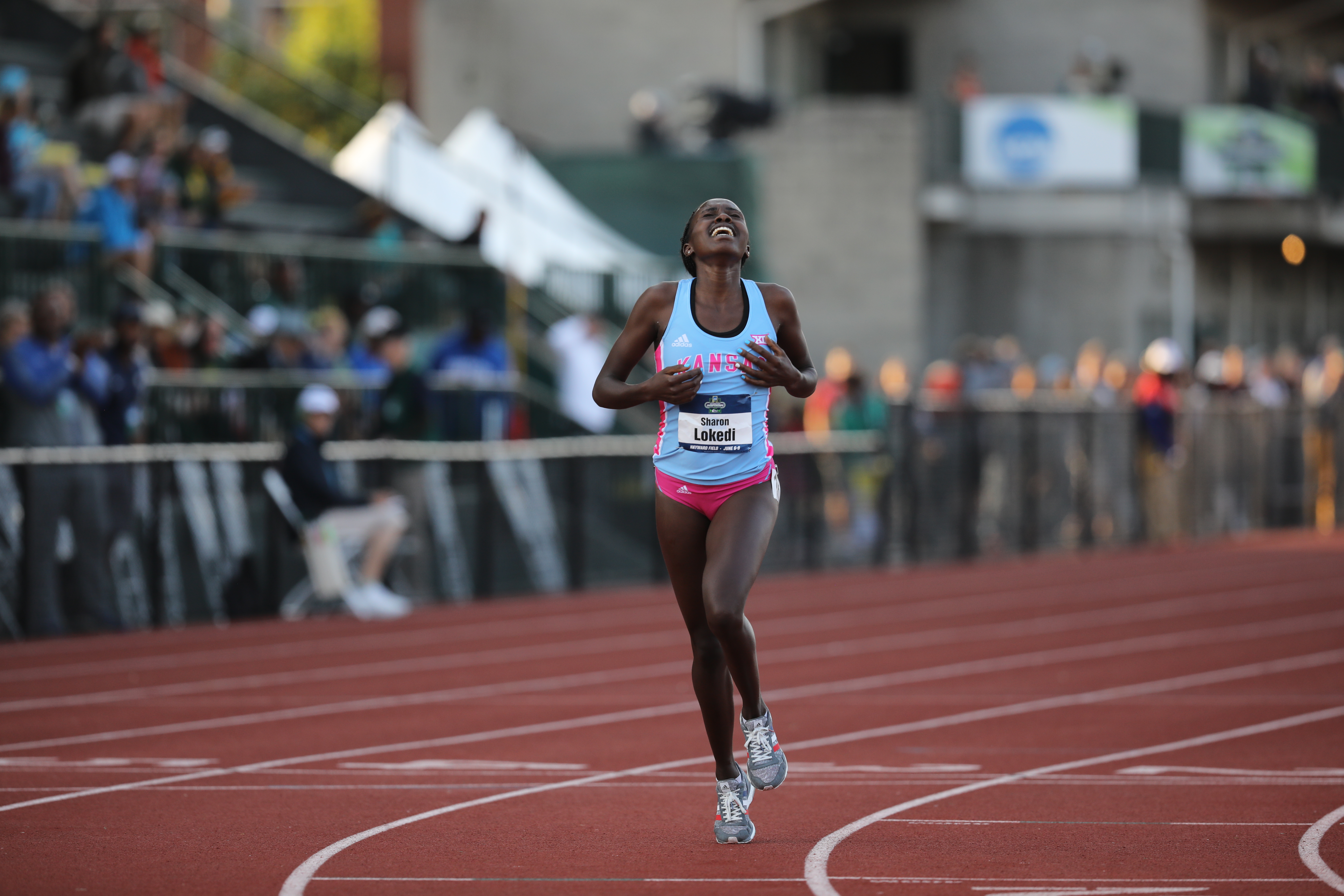 2018 NCAA Outdoor 10K